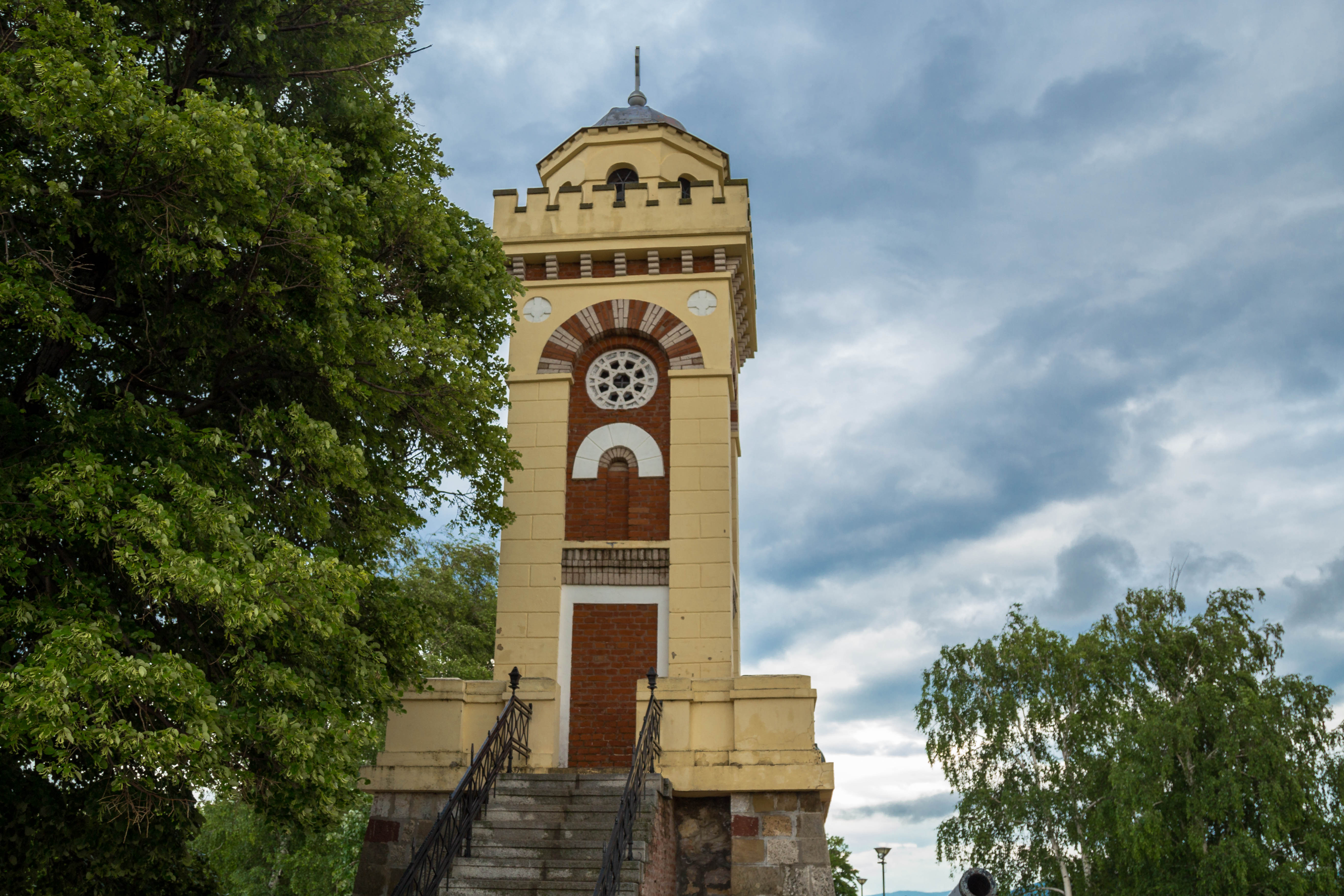 Das Denkmal wurde zur Ehren der Schlacht zwischen osmanischen Truppen und serbischen Aufständischen, die am 31. Mai 1809 stattfand, errichtet.